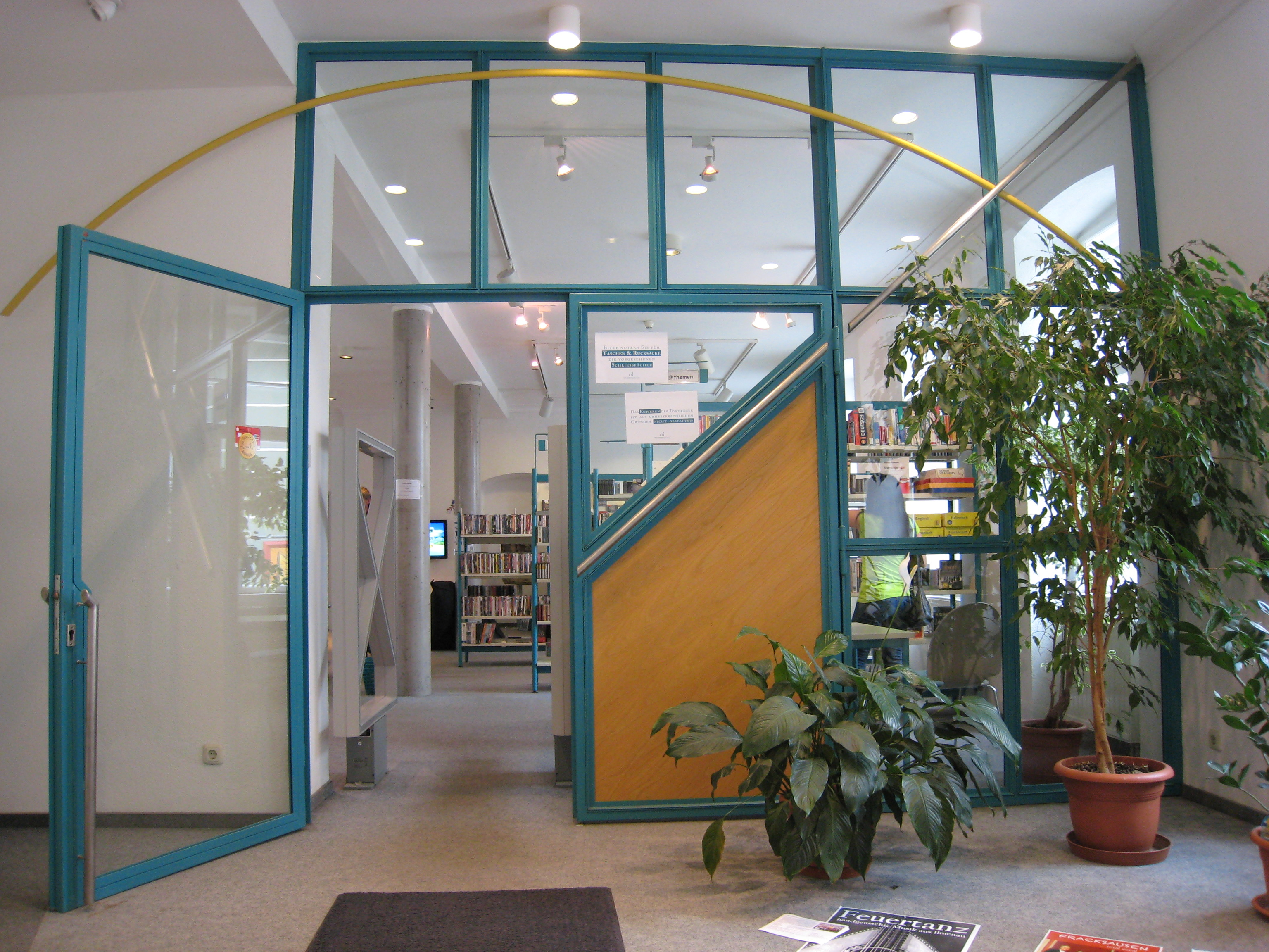 Medienstelle in der Bibliothek Arnstadt (Prinzenhof).